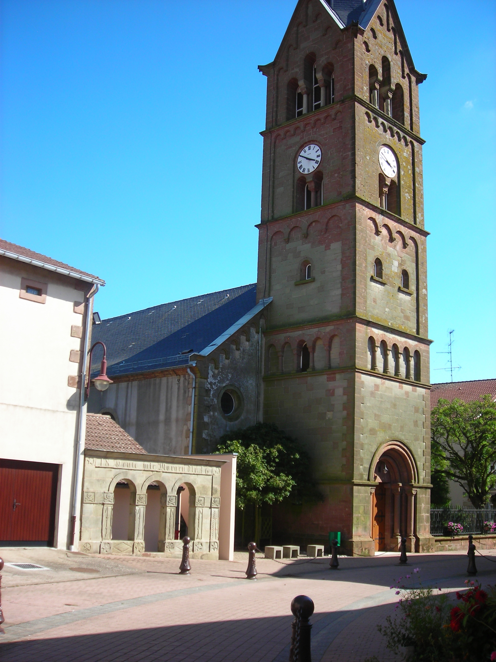 Façades de l'église et de l'ossuaire de Boucheporn (Moselle, France)